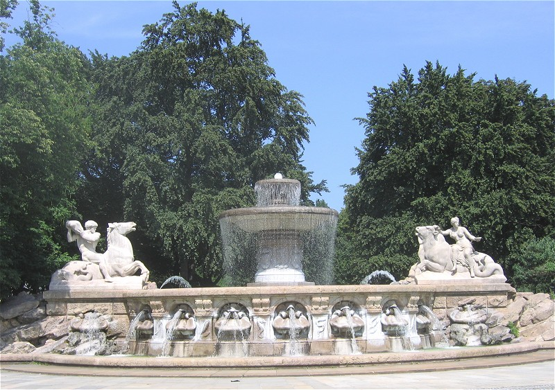 Wittelsbacherbrunnen in Muenchen